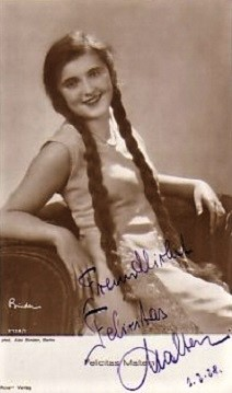 Fee Malten